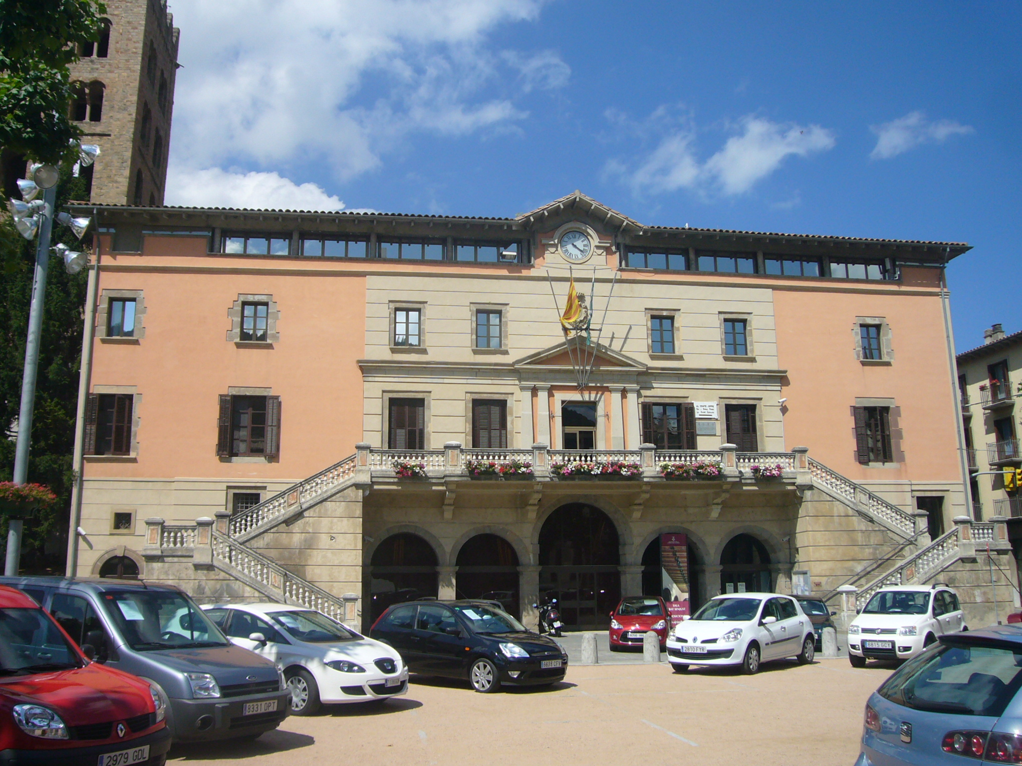 Ajuntament de Ripoll i plaça